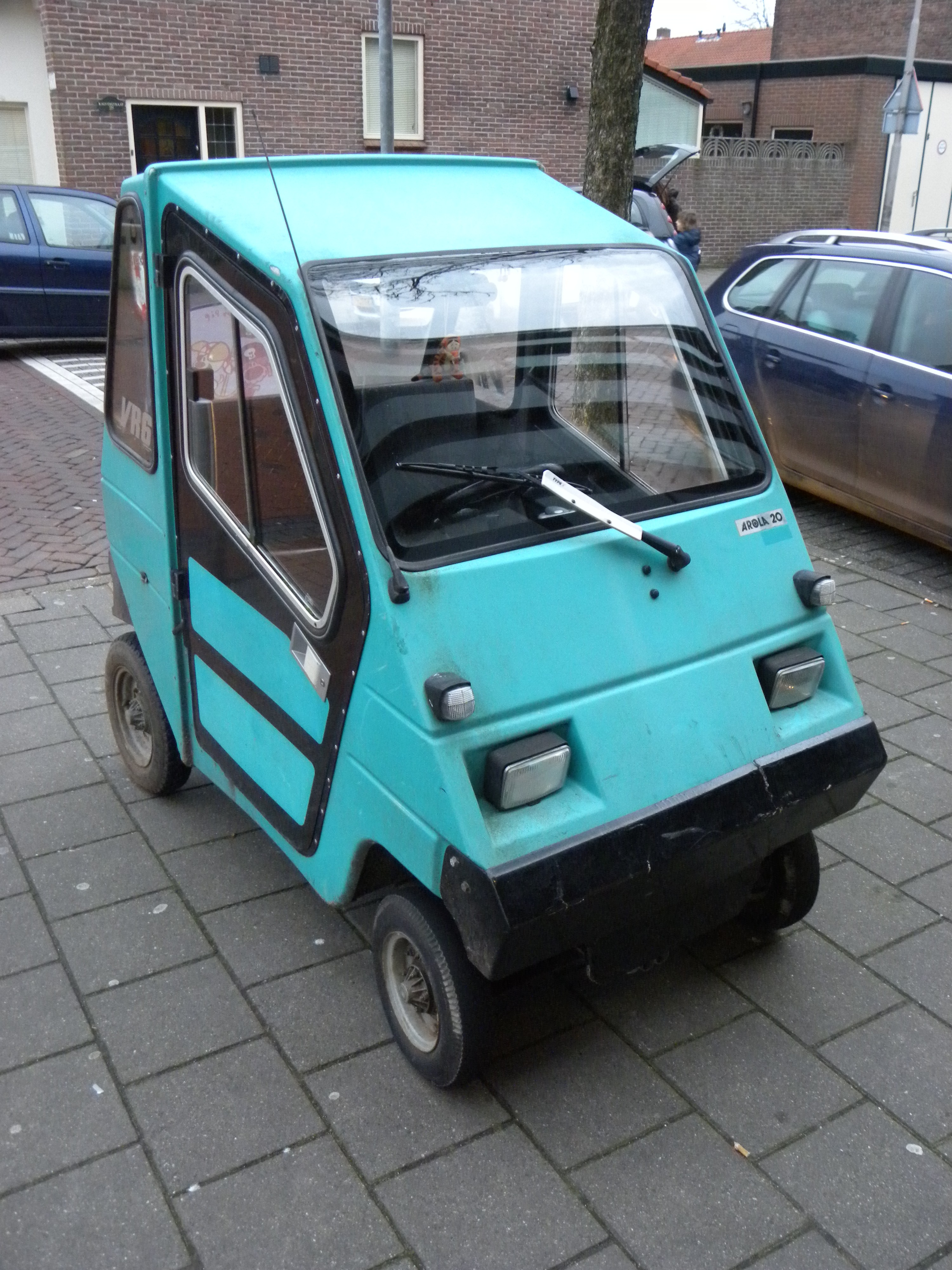 Arola 20 (1982-1983)